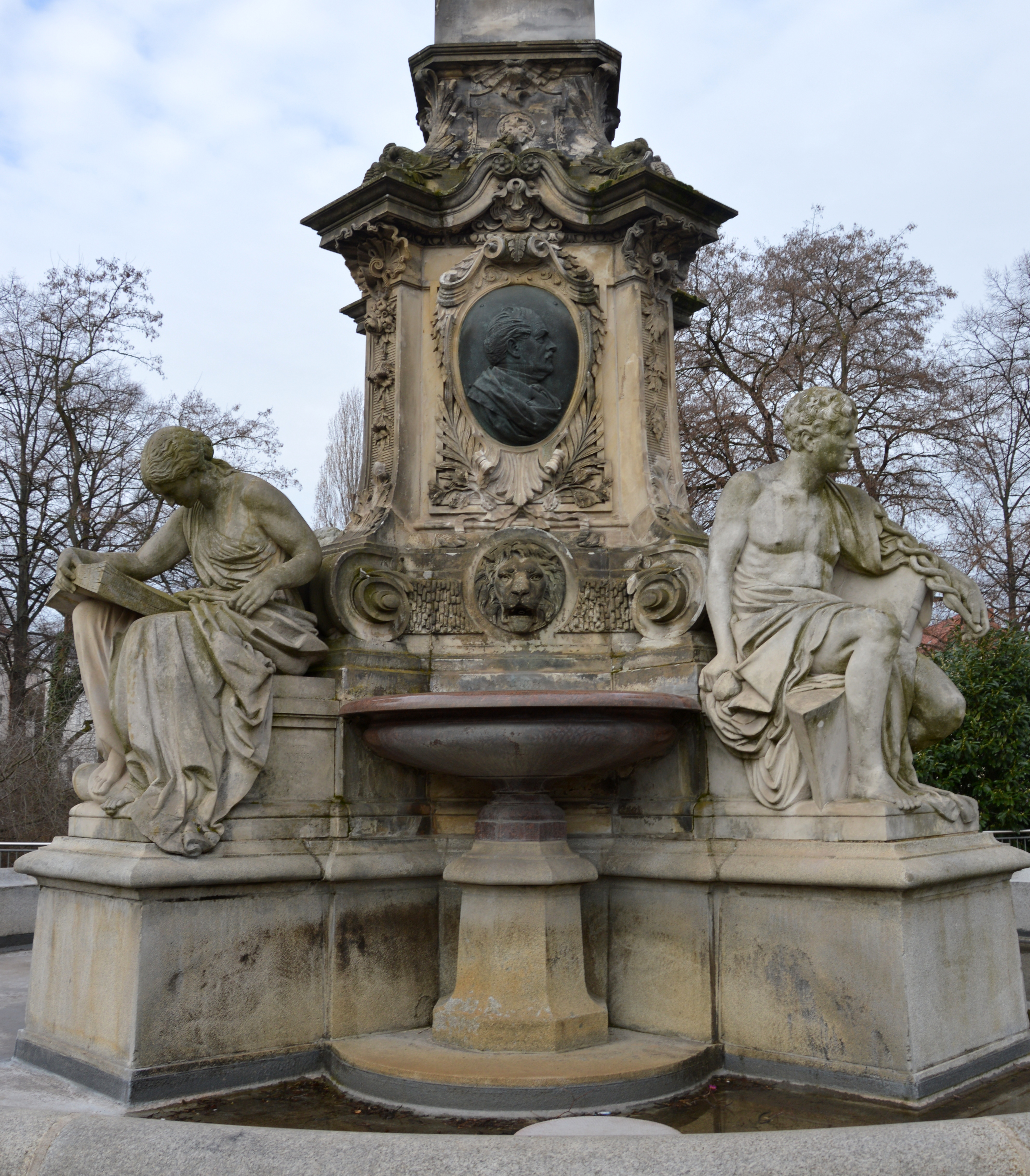 Hasselbachbrunnen